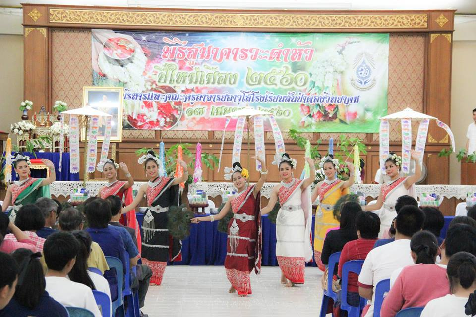 พิธีรดน้ำดำหัวคณาจารย์ 2560